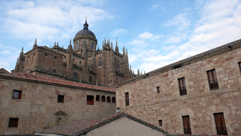 Catedral Nueva de Salamanca